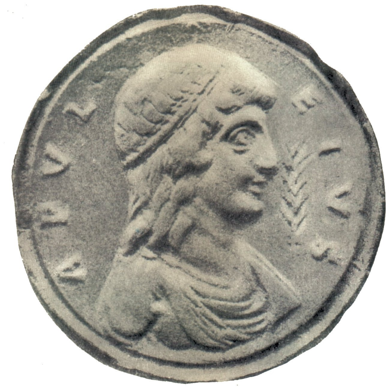 Конторниат (памятный медальон) IV—V веков с надписью "Апулей" (Apuleius). Используется в некоторых изданиях произведений Апулея как его возможный портрет.